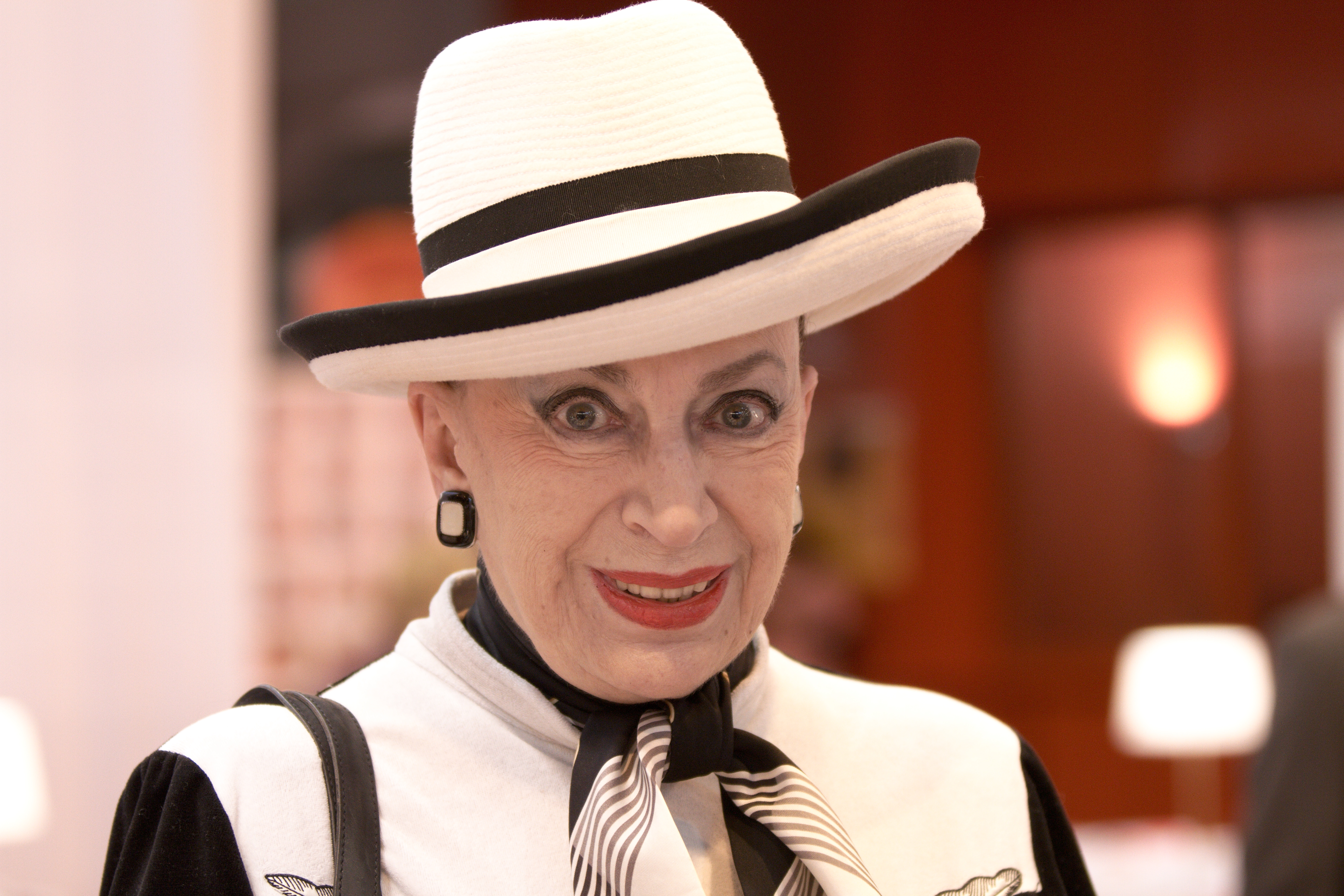 Geneviève de Fontenay au Salon du livre de Paris lors de la dédicace du livre L'Histoire secrète des Miss France.